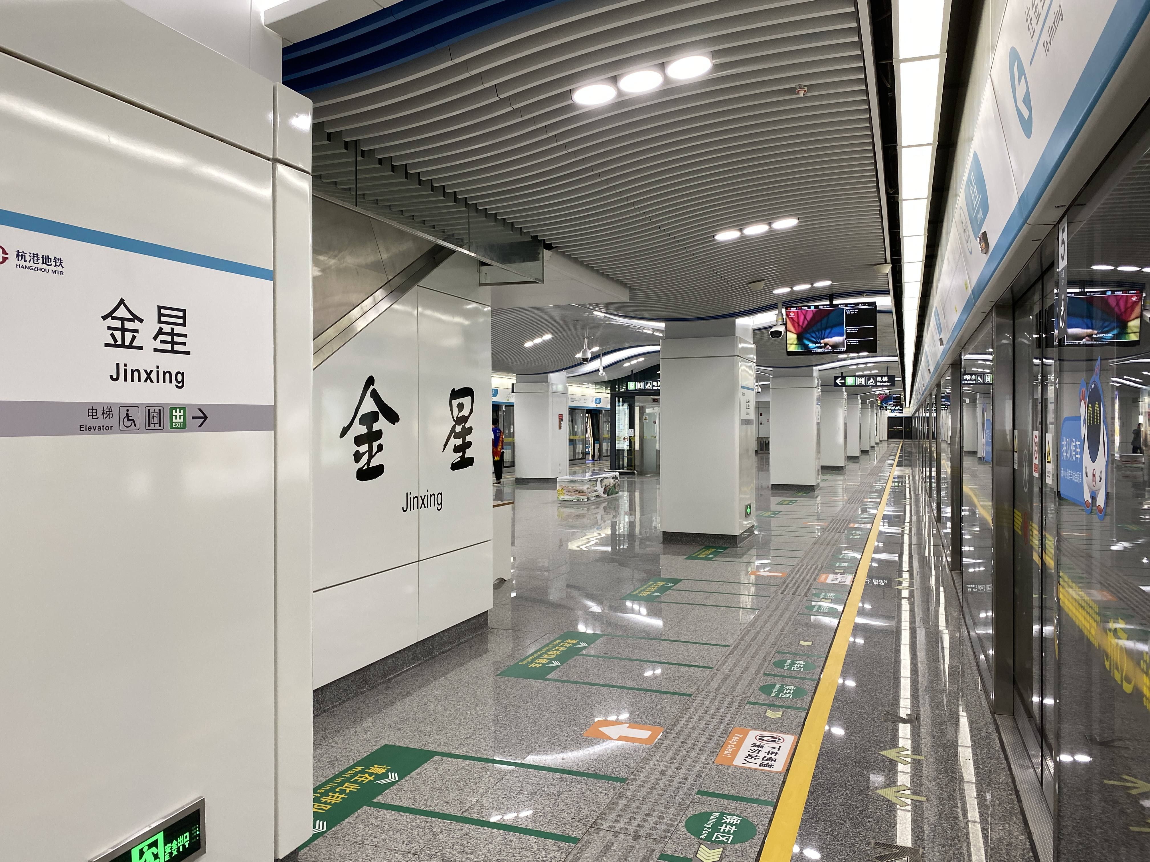 20200503金星站站台